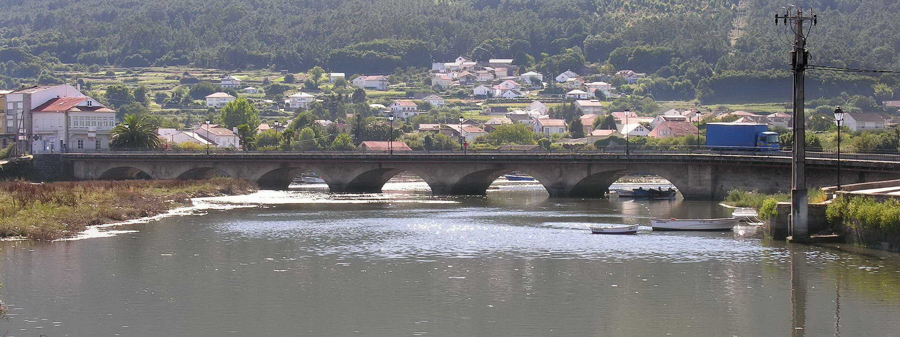 Ponte medieval de Noia, Galicia. Publish by= Luis Miguel Bugallo Sánchez.